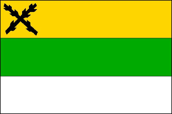 Vlajka obce Kojetín (okres Havlíčkův Brod)